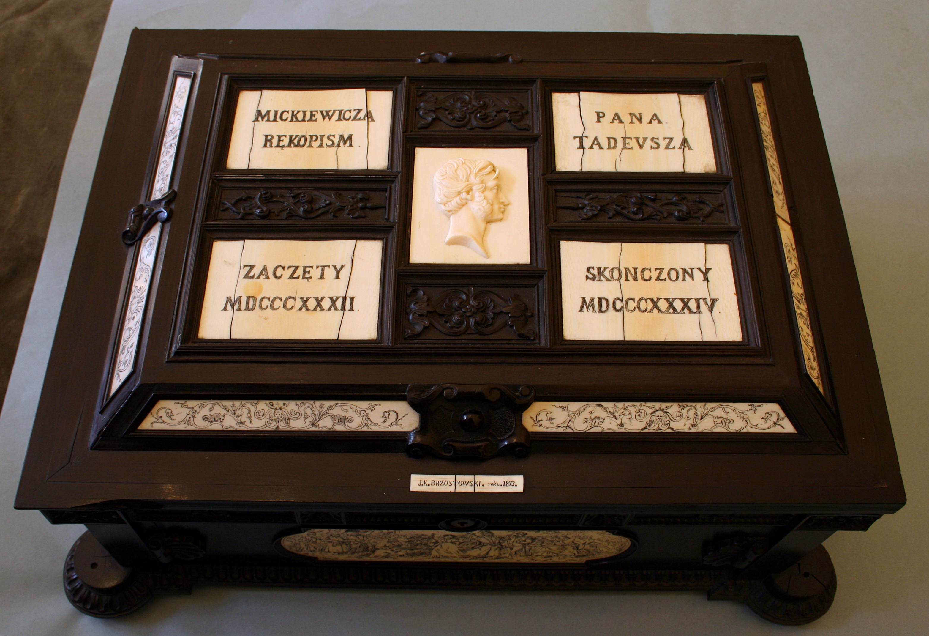 Rękopis Pana Tadeusza w zbiorach Zakładu Narodowego im. Ossolińskich we Wrocławiu.